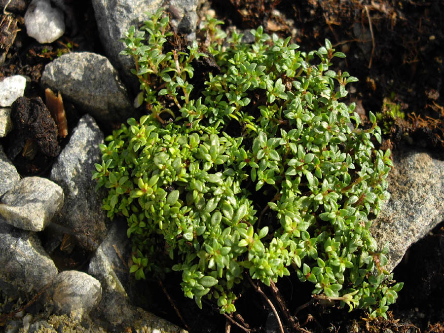 Thymus praecox 'Pygmaeus'